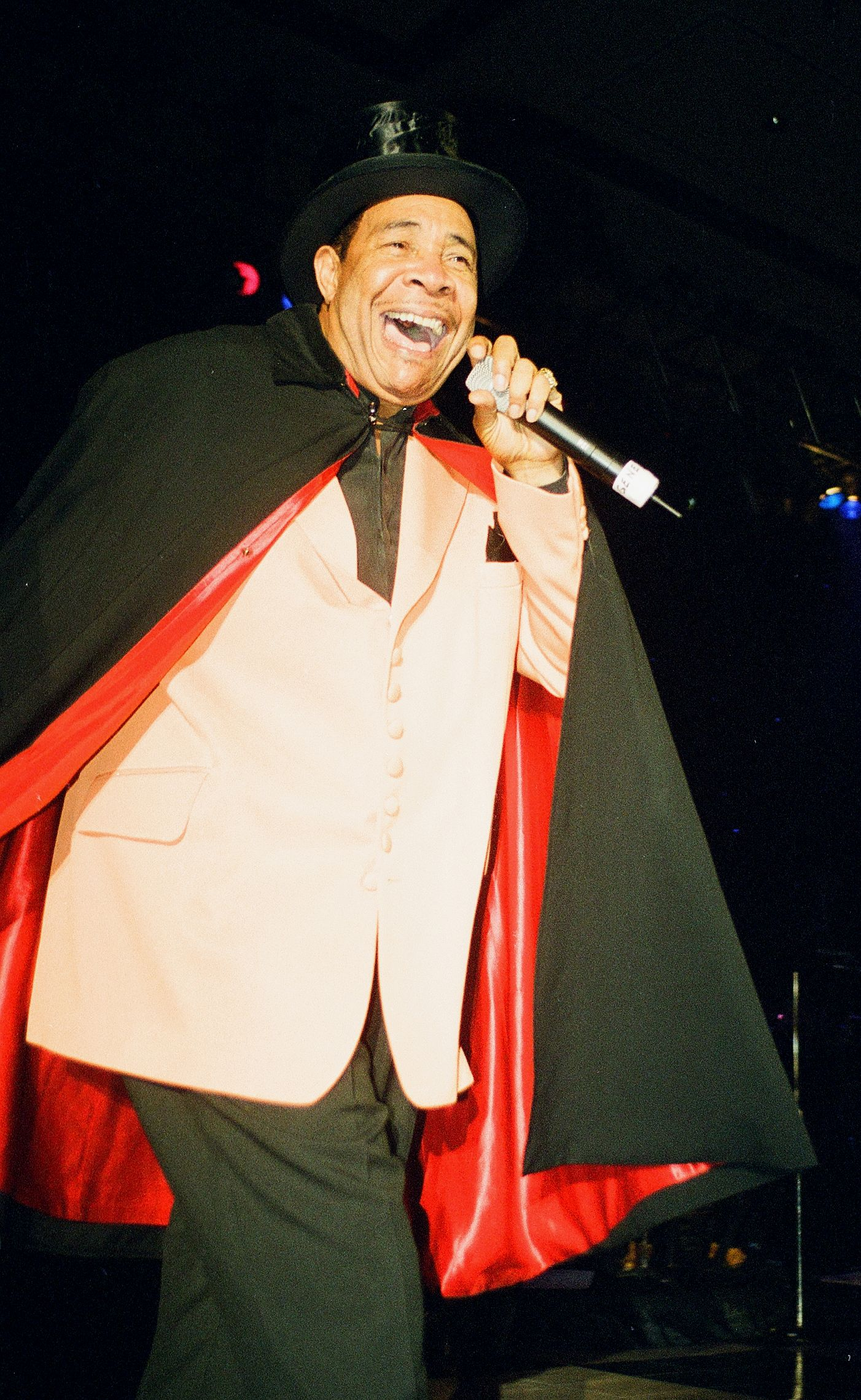 Wash D.C. 1997